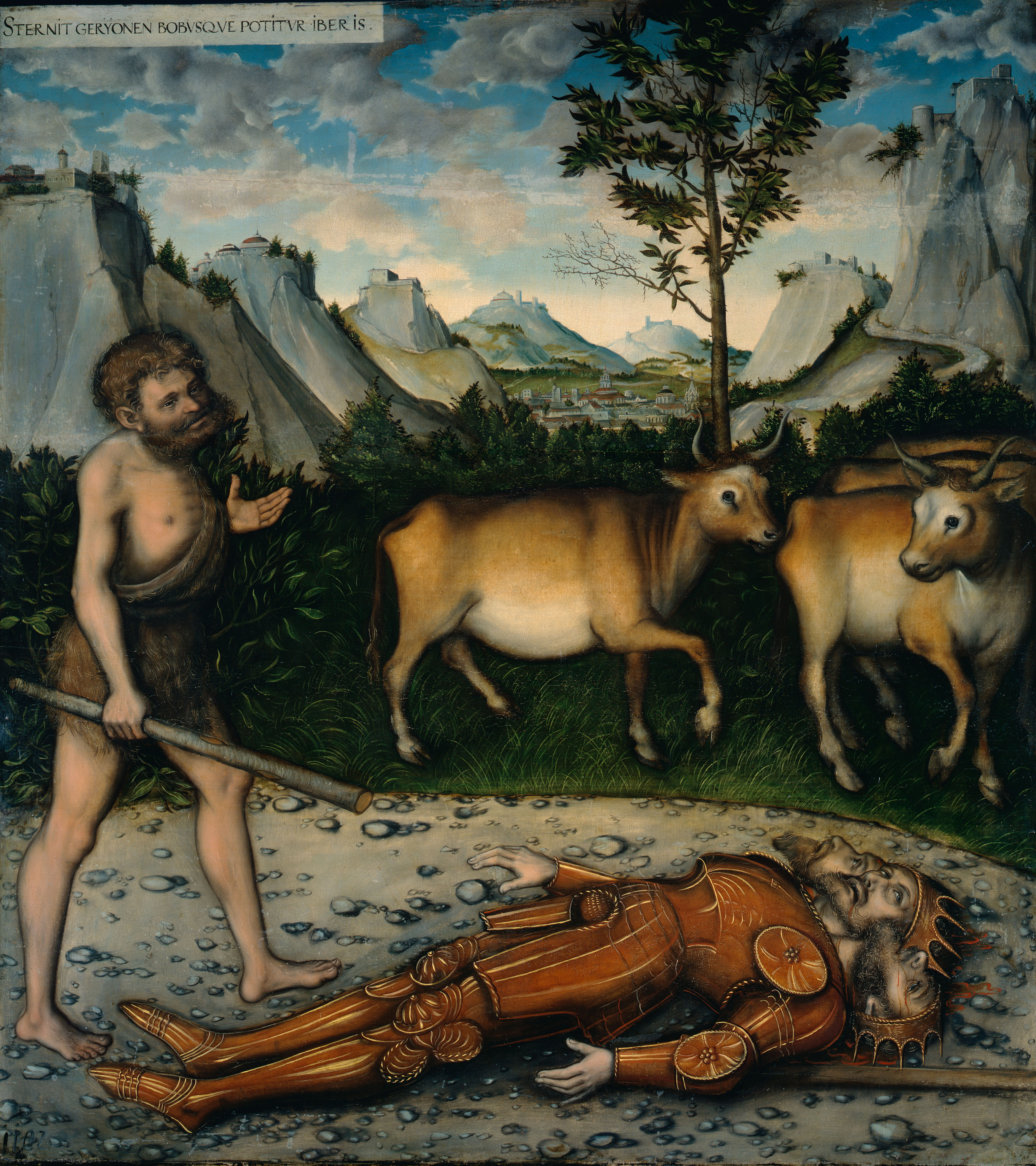 Bildfolge zur Herkules-Legende